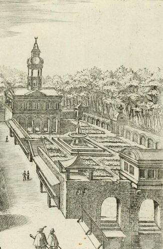 гравюра Ганс Вредеман Типовий голландський ренесансний сад